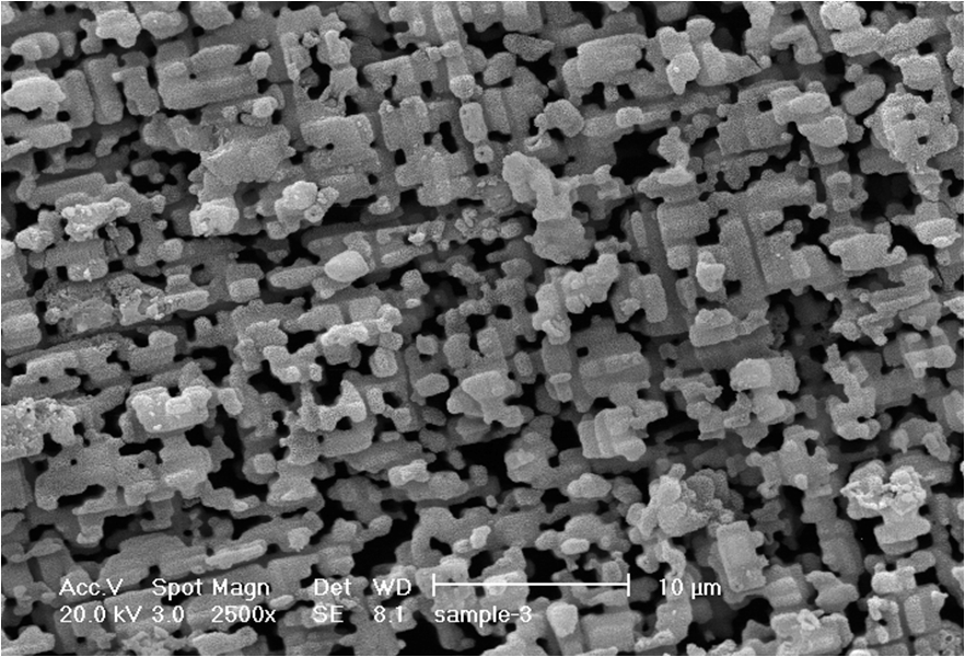 Oberfläche einer aufgerauten Anodenfolie eines Aluminium-Elektrolytkondensators